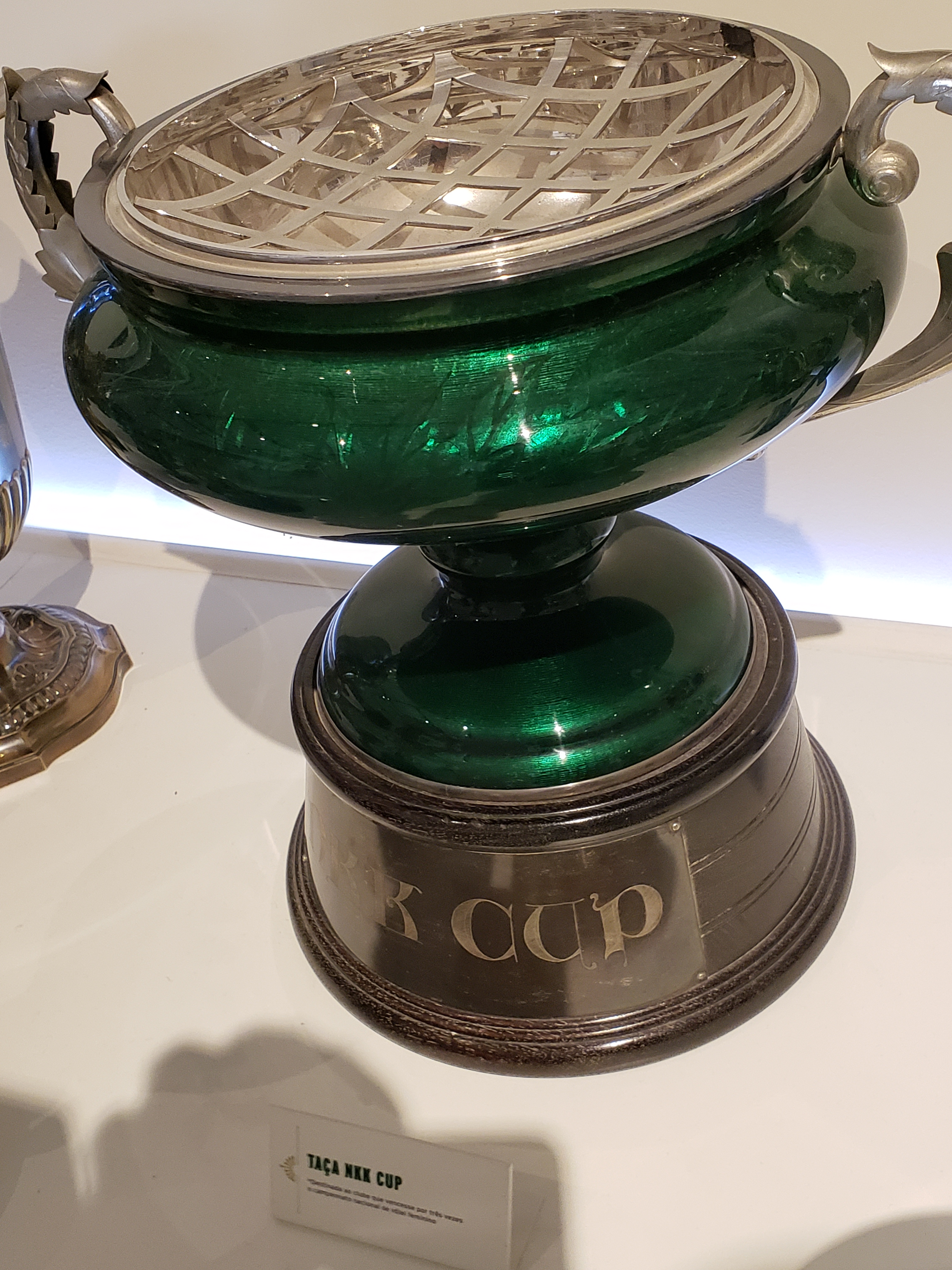 Destinada ao clube que vencesse por três vezes o Campeonato Nacional de Vôlei Feminino e conquistada pelo Fluminense Football Club.